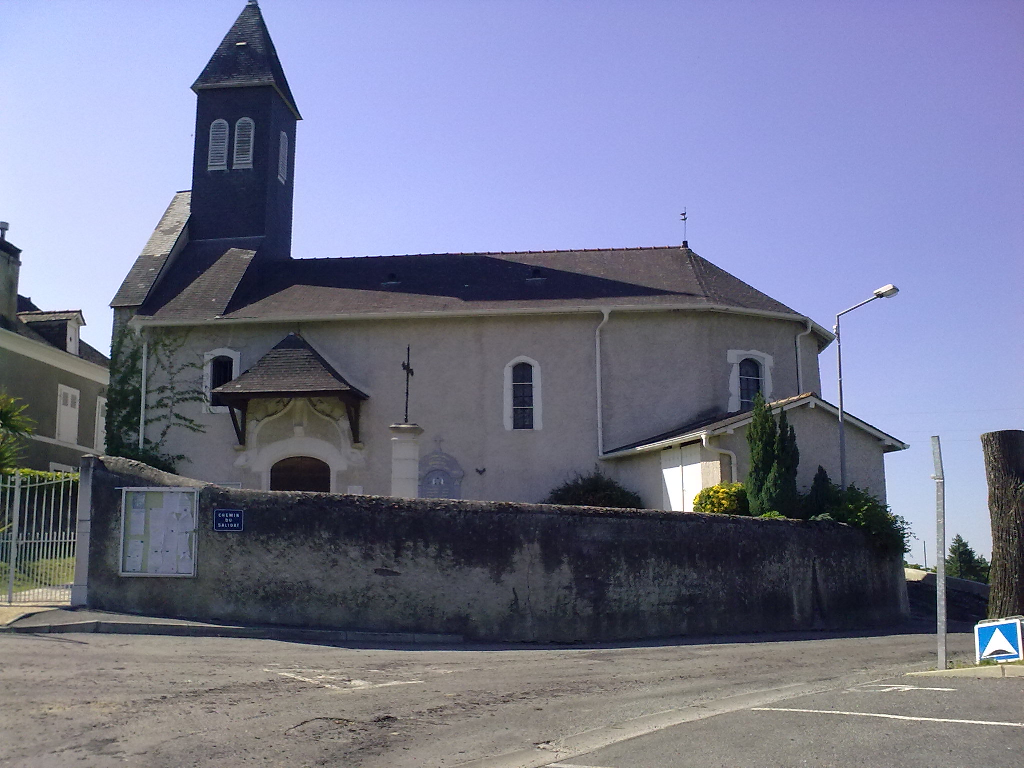 Eglise de Bourdettes vue 2.